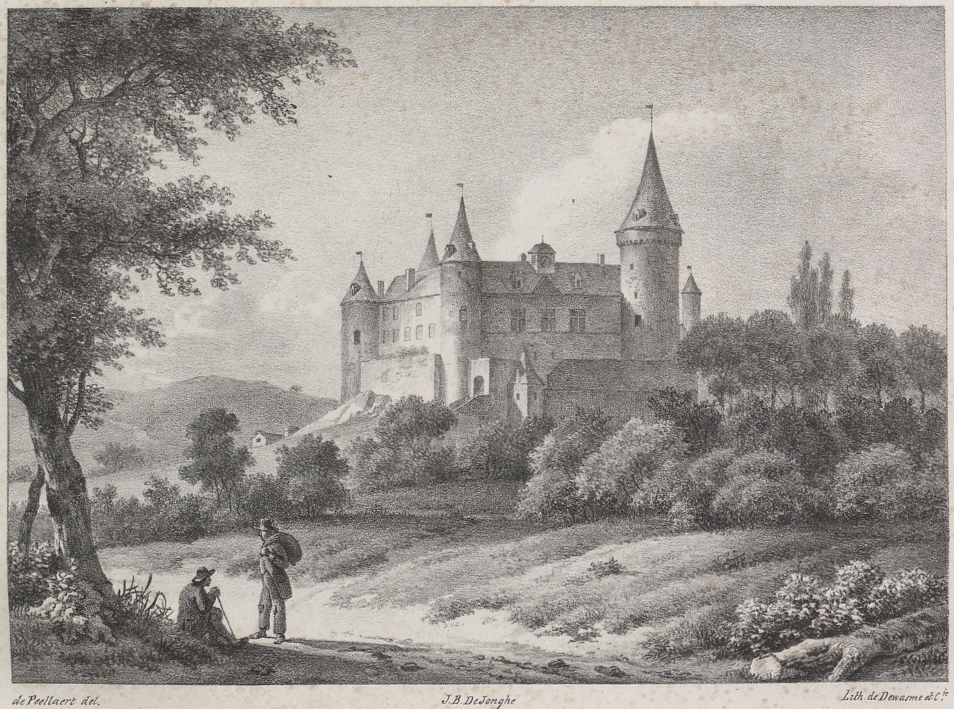 Kasteel van Celle